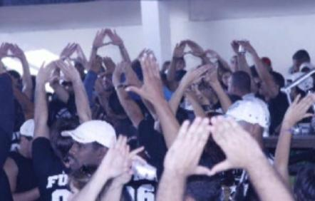 Festa da Fúria Jovem do Botafogo.